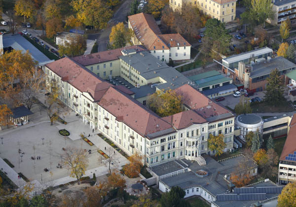 A balatonfüredi szívkórház madártávlatból